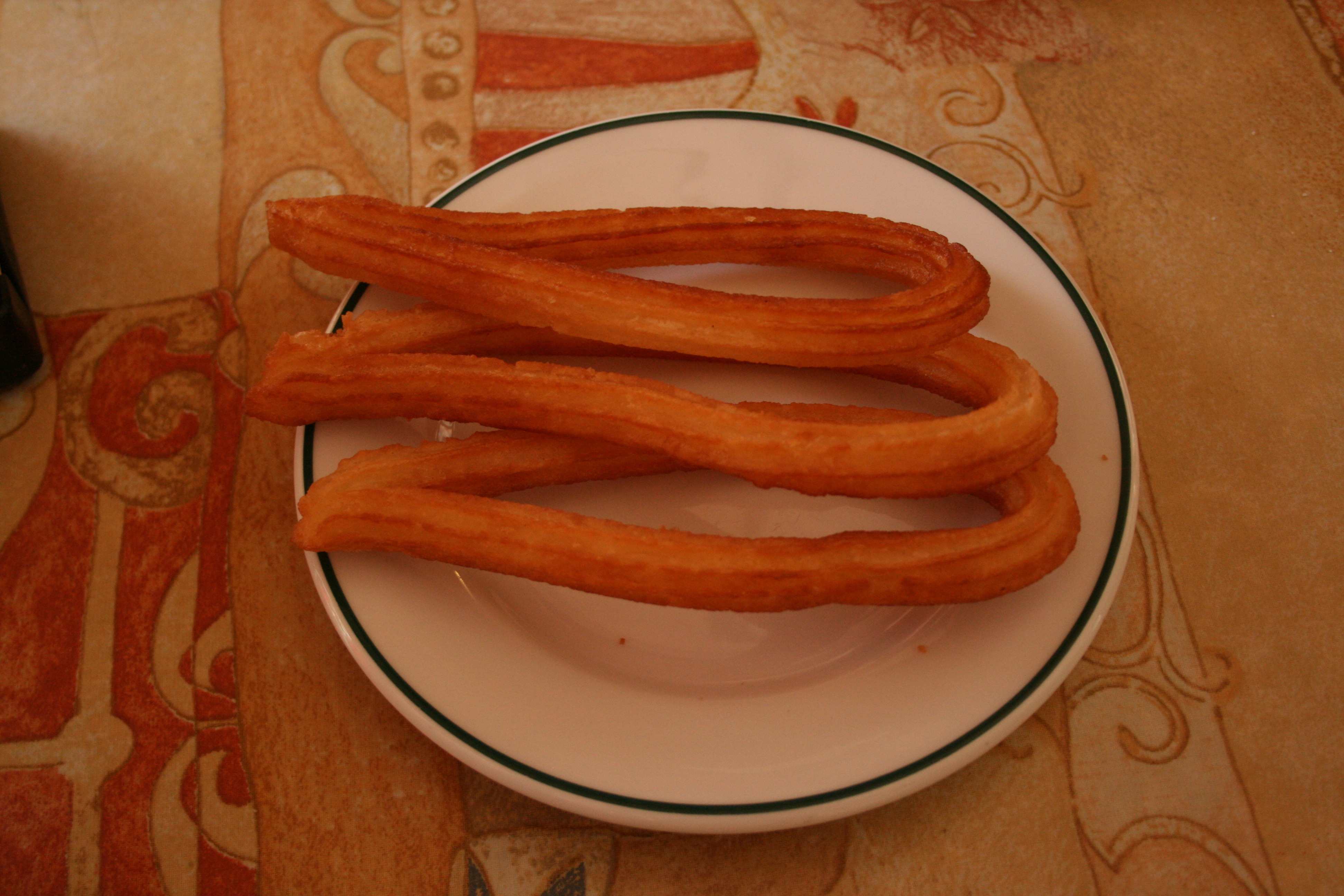 Churros - Madrid